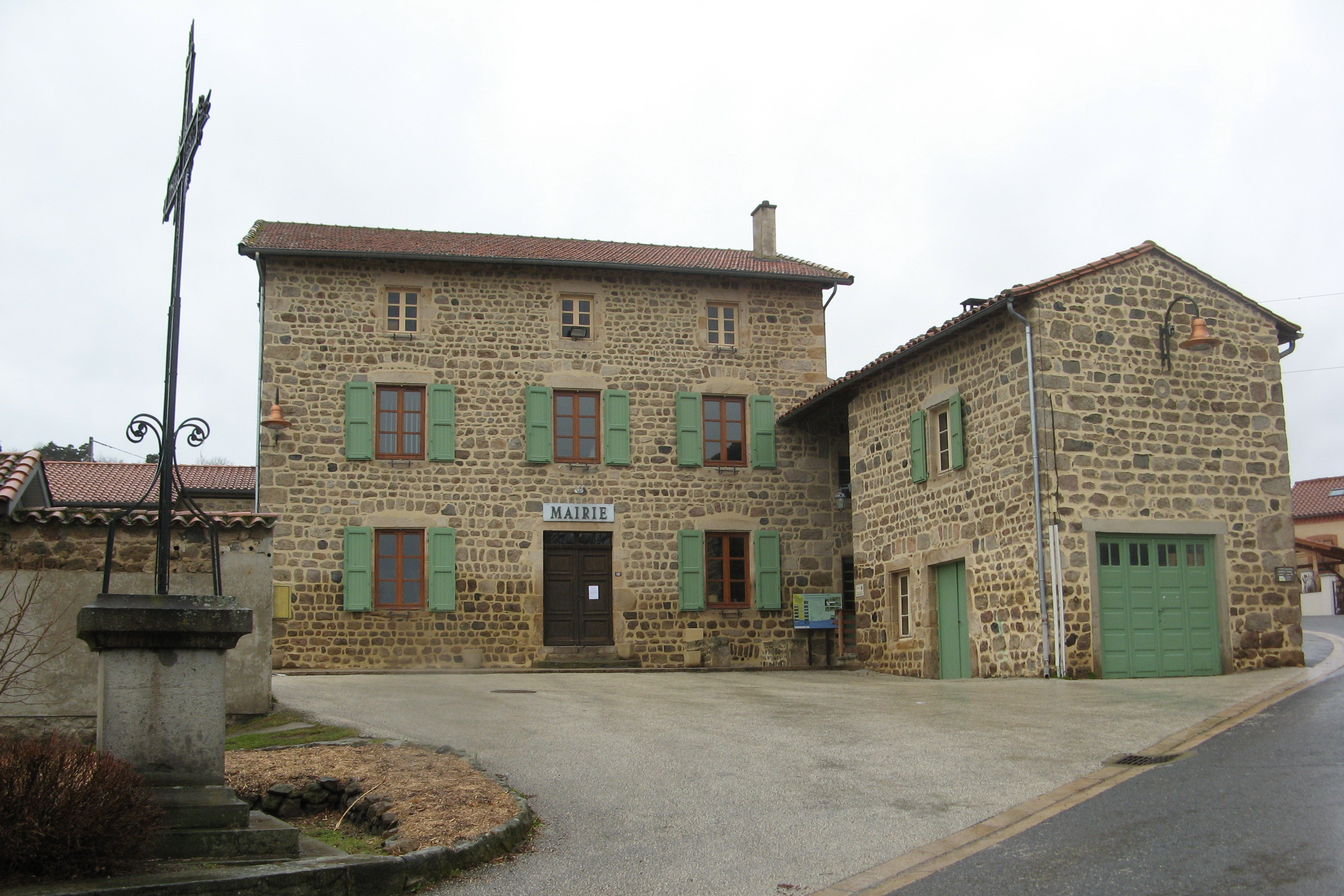 Essertines-en-Châtelneuf, mairie